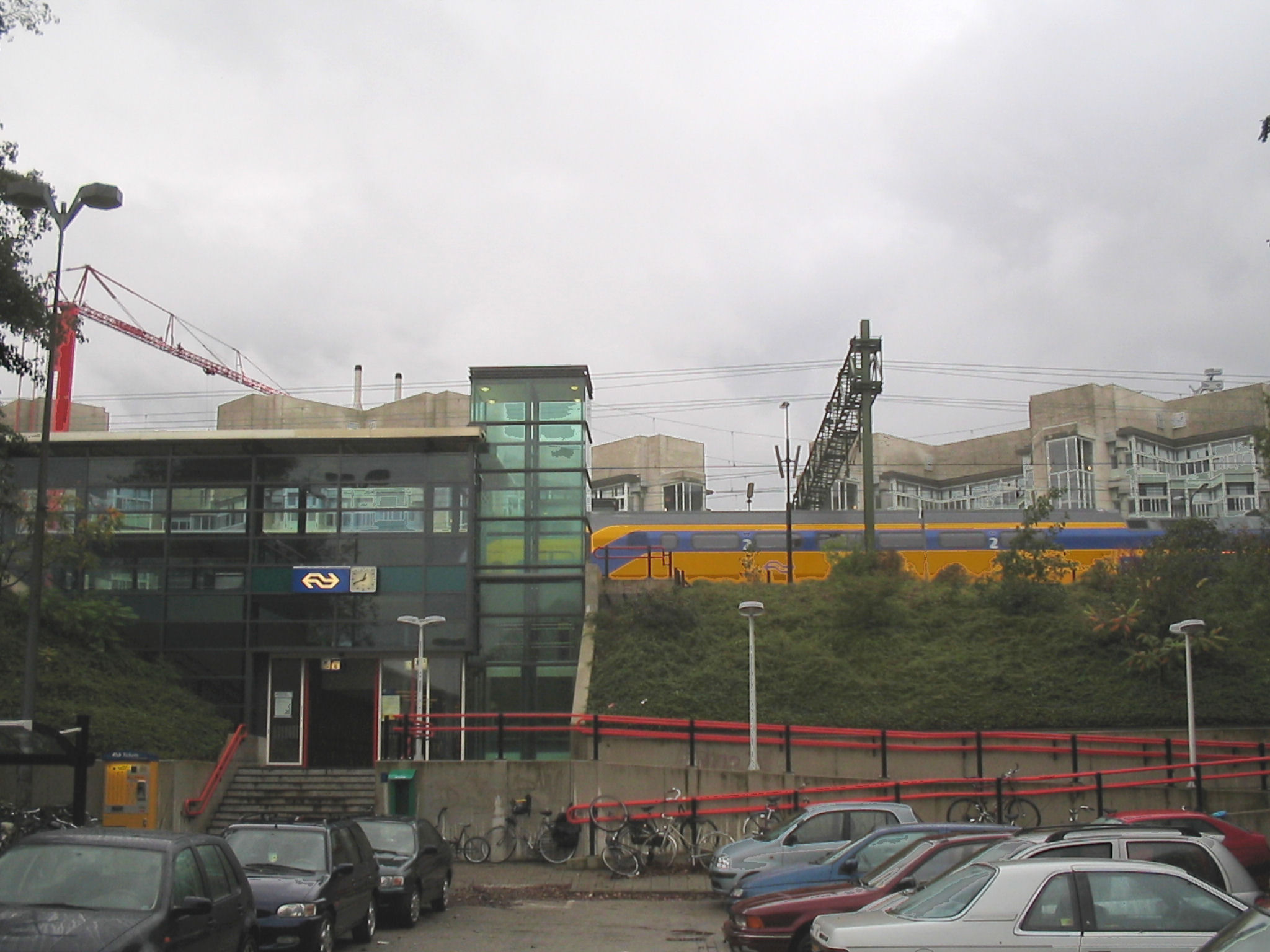 station Den Haag Laan van NOI, Den Haag, 15 november 2005